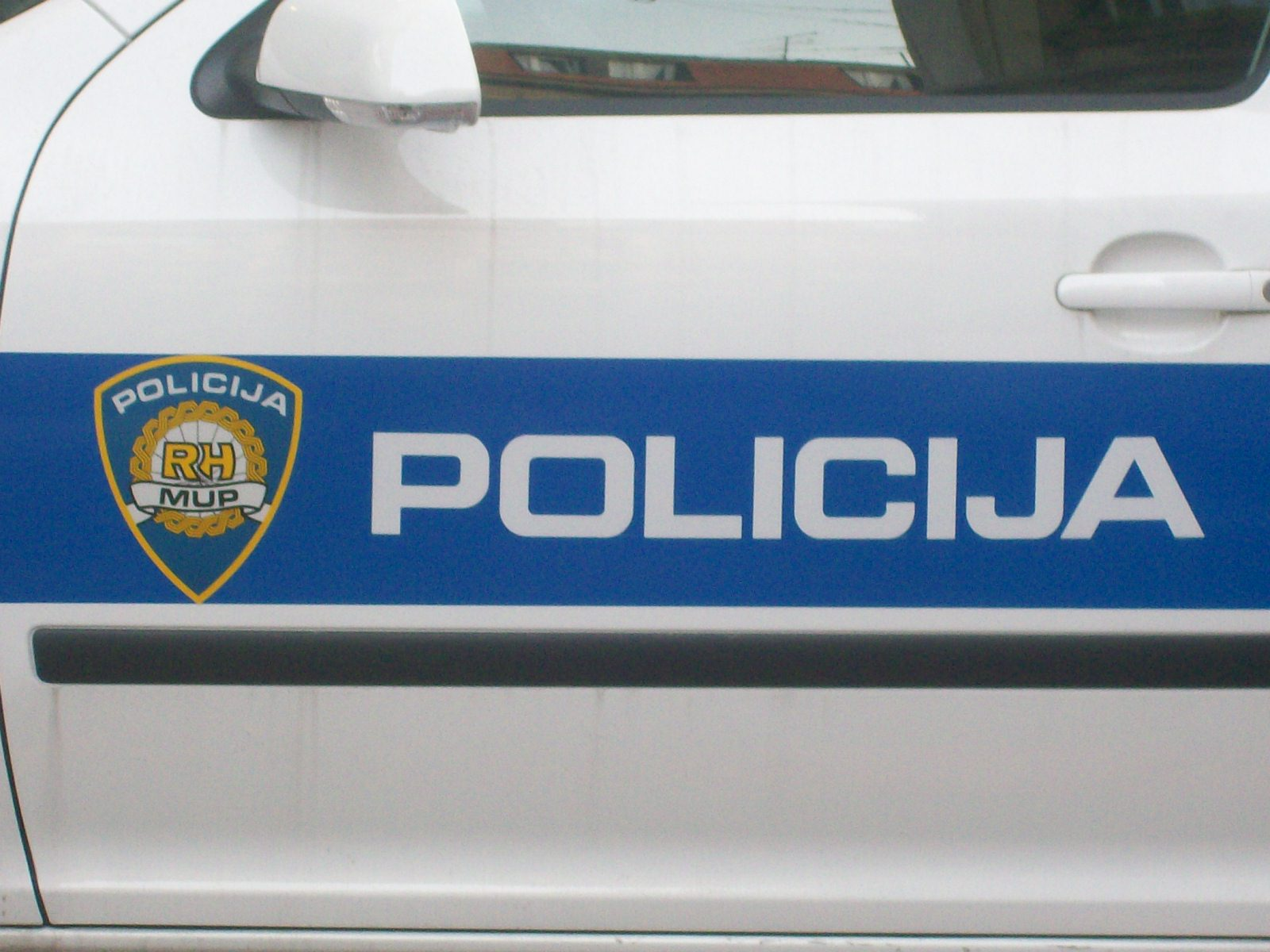 Oznaka policijsko vozilo